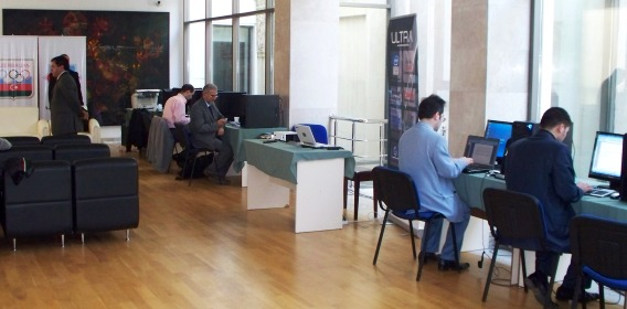 пресс-центр турнира Сб. Мира - Сб. Азербайджана по шахматам в Баку